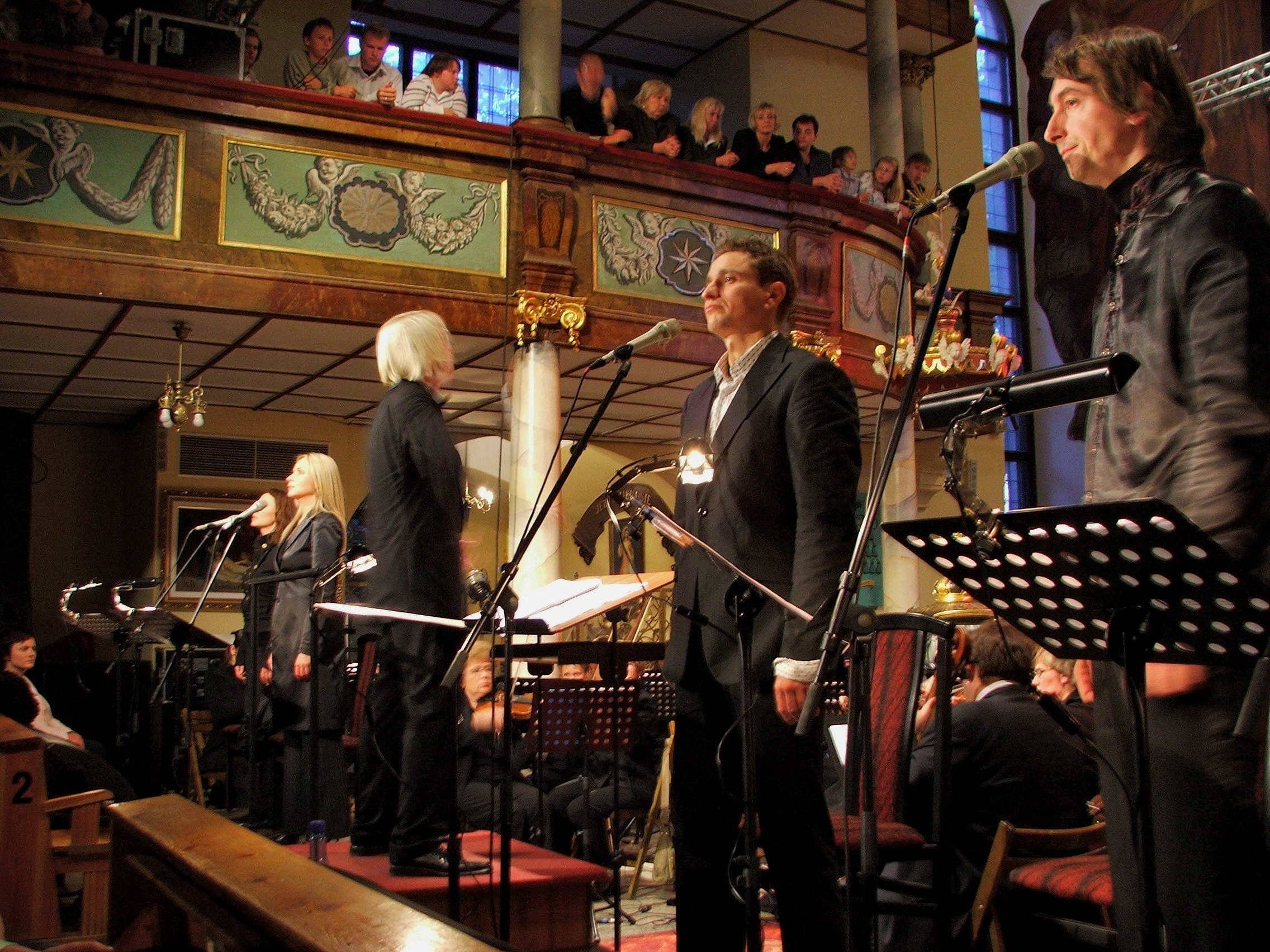 Zdjęcie wykonane podczas koncertu Świętokrzyska Golgota, który odbył się 24 września 2005 w kościele pod wezwaniem Podwyższenia Krzyża Świętego Zdjęcie zostało udostępnione przez autora na zasadach PD.